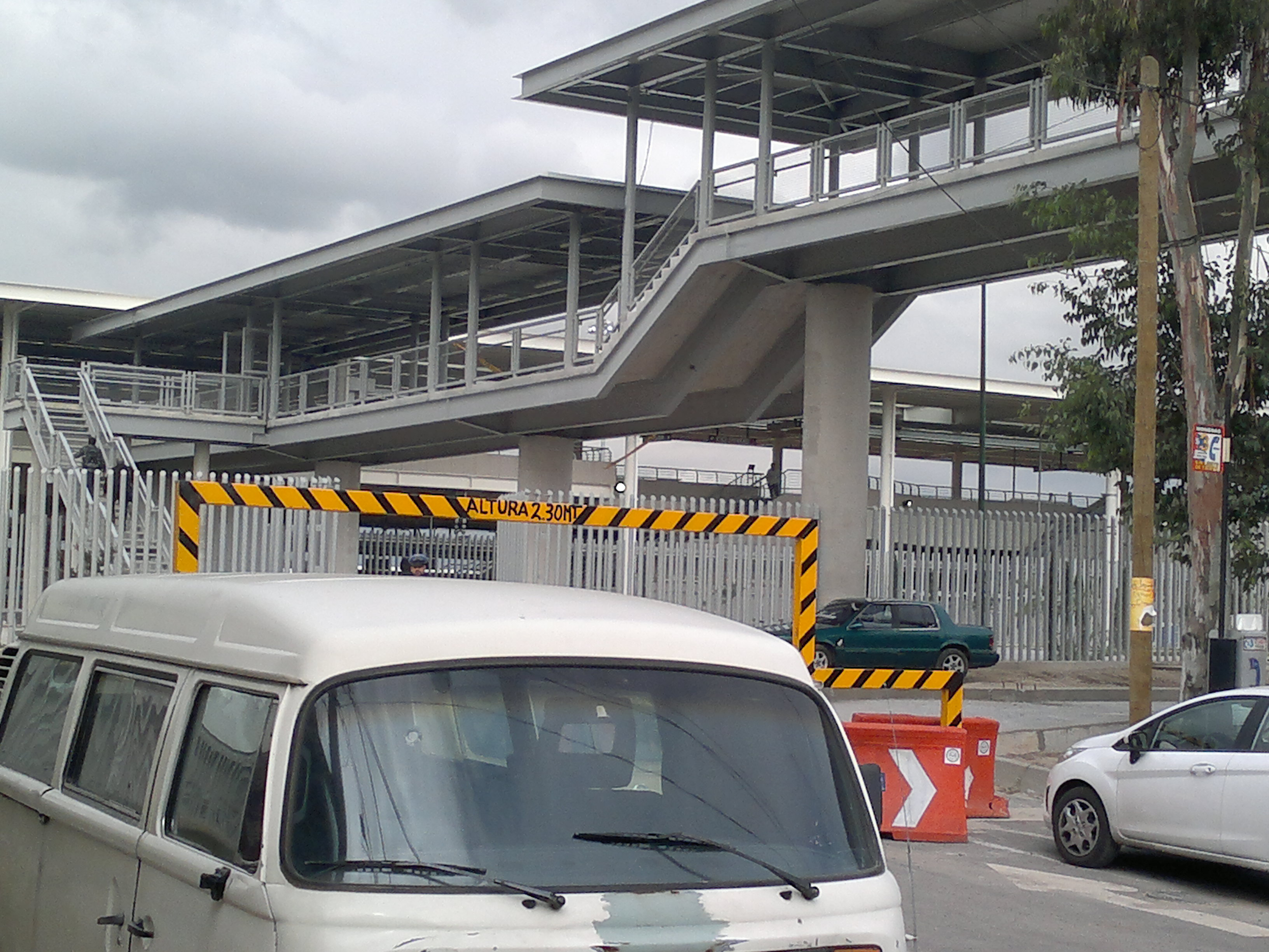 Exterior de la Estación Tláhuac de la Línea 12 del Metro de la Ciudad de México